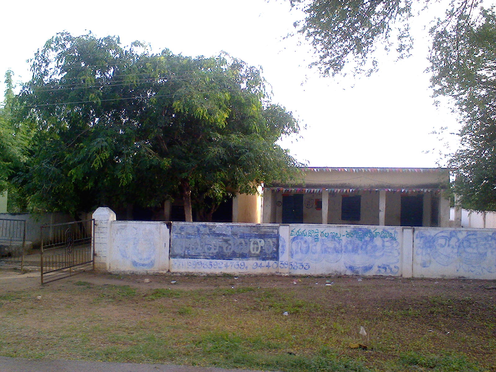 ప్రాథమిక పాఠశాల, పెద్దపాడు